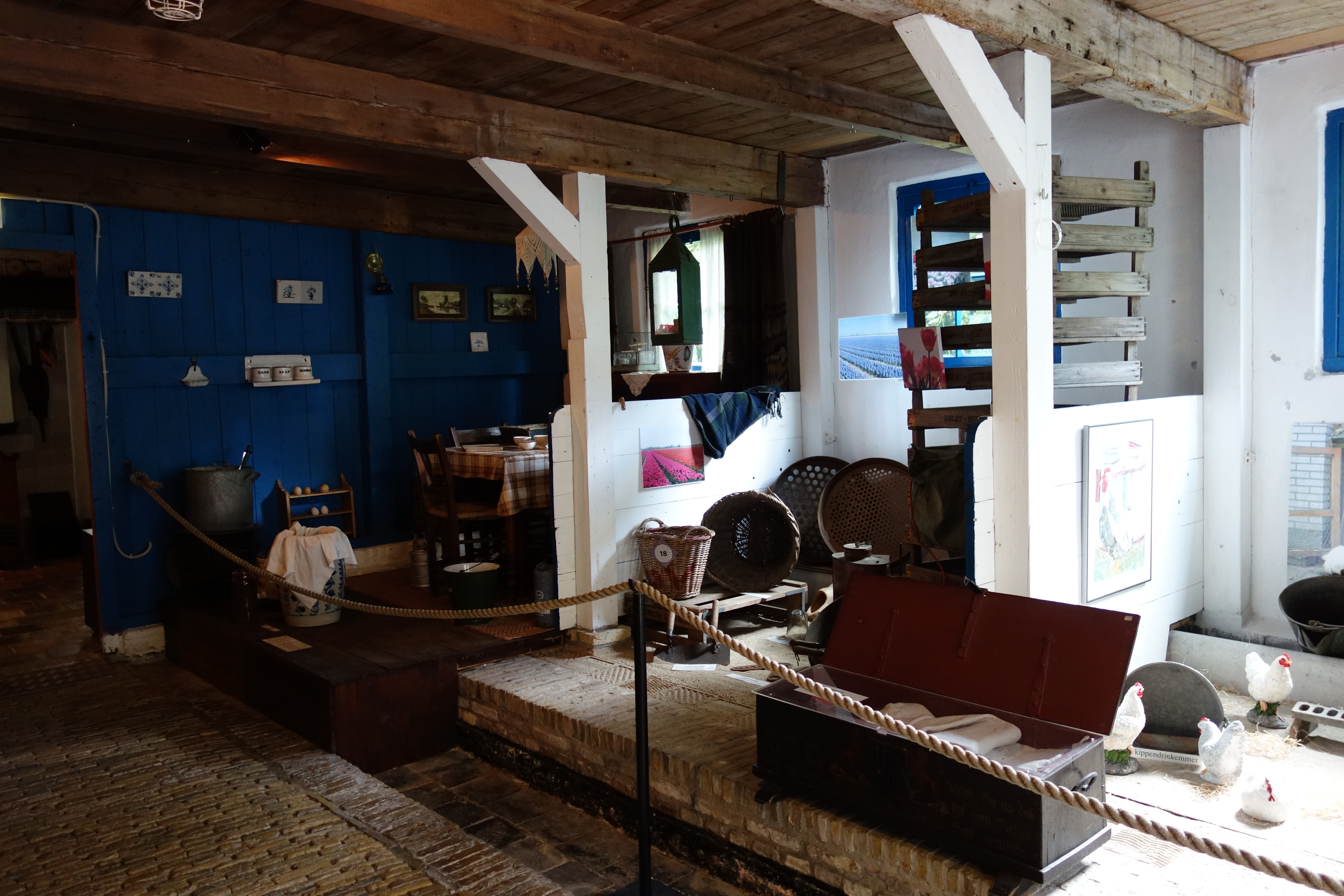 Zomerstal in een van de stallen van Loet 14. Deze stallen (twee rijen tegenover elkaar) waren voor het kleinvee (geiten, schapen, etc.) In de zomer verbouwden de boeren een of meerdere van de stallen tot woonkamer, achterin staat daar een voorbeeld van.